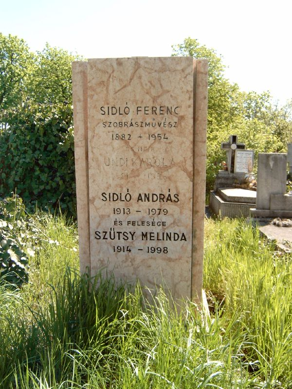 Sidló Ferenc (Bp., 1882. jan. 22. – Bp., 1954. jan. 8.): szobrász sírja Budapesten. Új köztemető: 16/4-1-5.